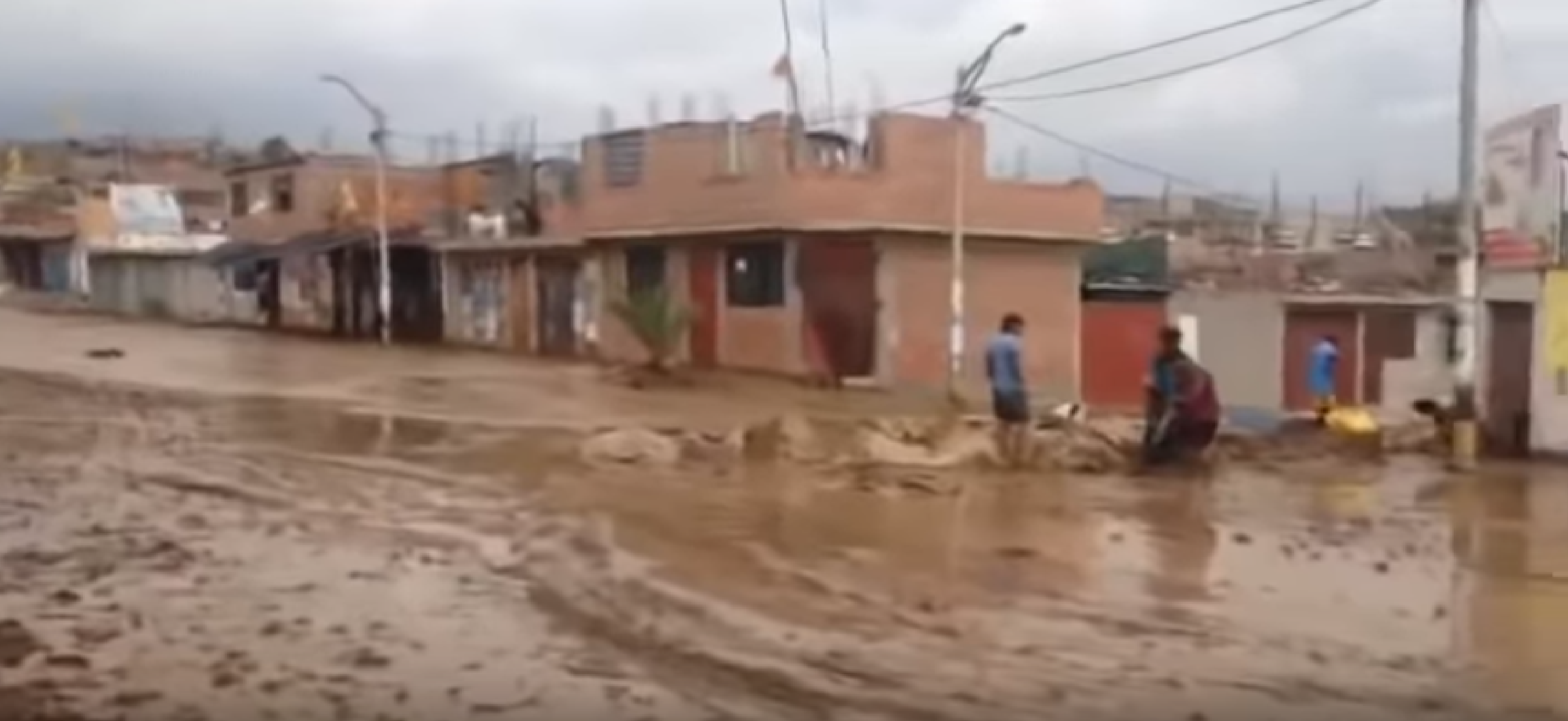 Distrito de Calana (Tarata) durante el Niño costero de 2019.